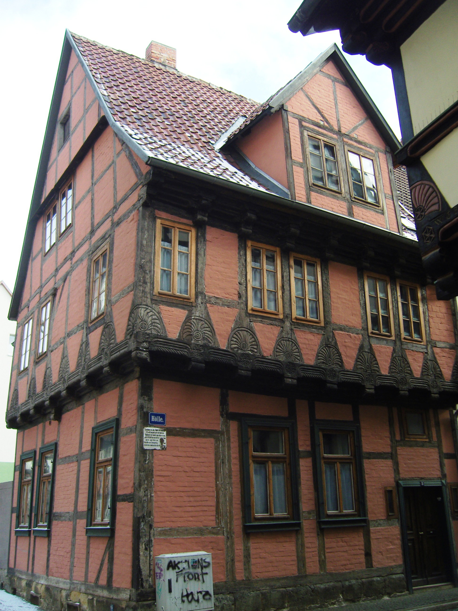 Denkmalgeschütztes Wohnhaus in der Straße Hölle 3 in Quedlinburg; gesehen von der Straße Stieg